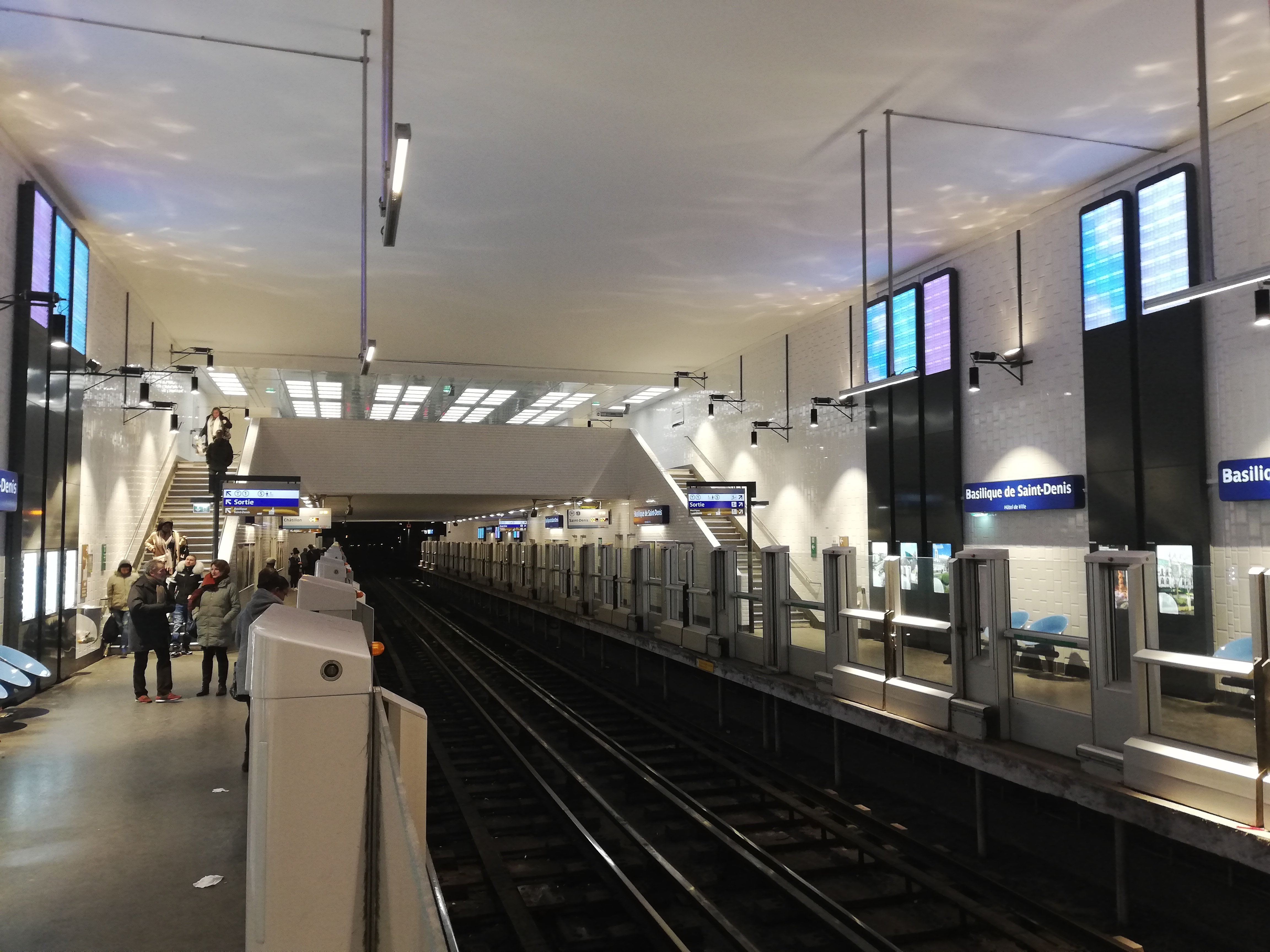 Quais de la station Basilique de Saint-Denis de la ligne 13 du métro de Paris, en 2019.